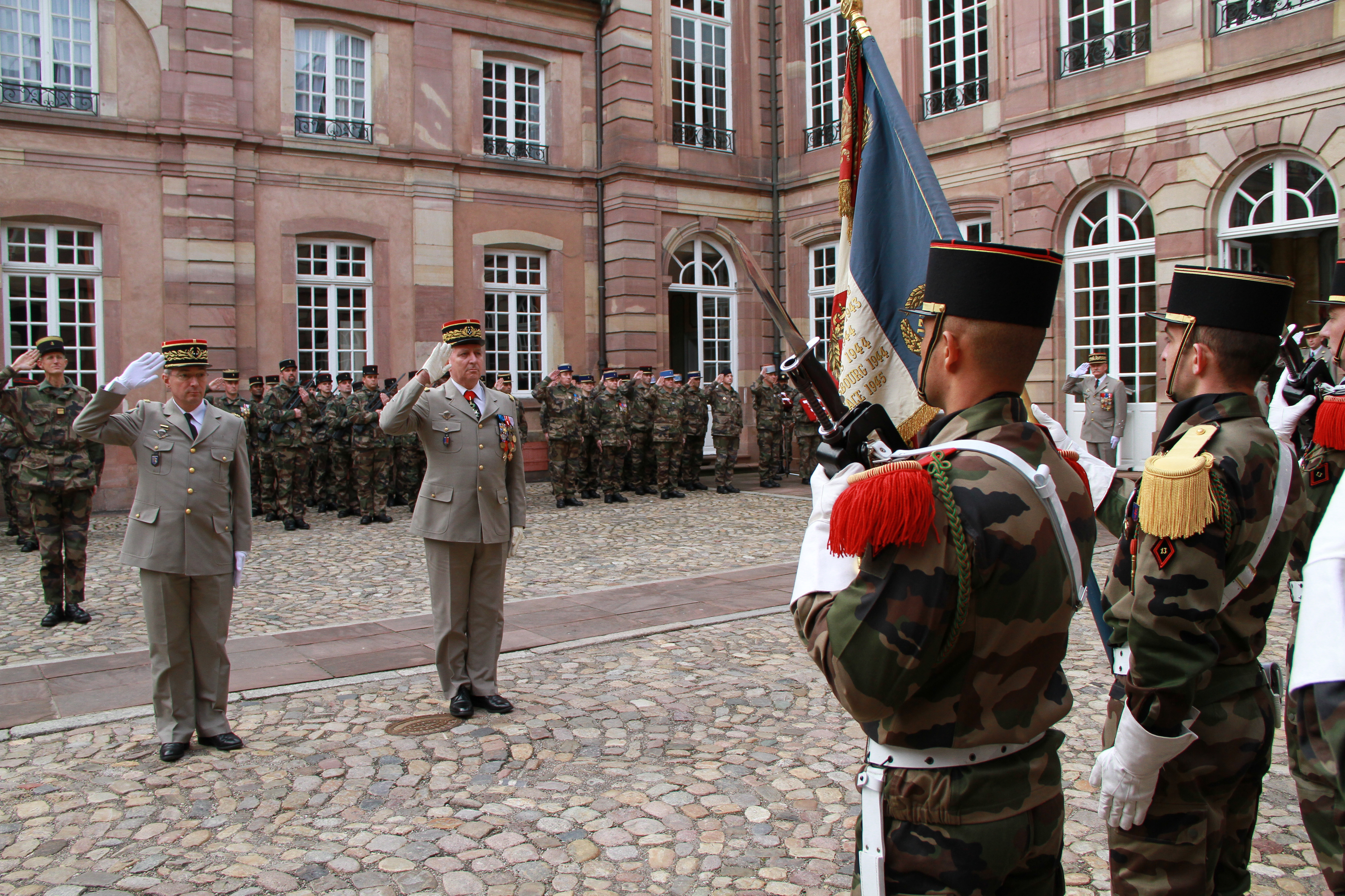 Les généraux Éric Hautecloque-Raysz et Bertrand Ract-Madoux, chef d’état-major de l’armée de terre lors de la prise d'armes au Palais du gouverneur militaire de Strasbourg, le 31 janvier 2013 à l’occasion du retour en France de la Task force Lafayette.